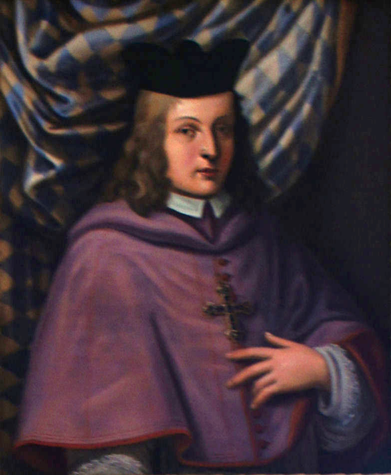 Porträtgemälde von Ruprecht von der Pfalz, Fürstbischof von Freising, im Fürstengang zwischen Fürstbischöflicher Residenz und Freisinger Dom.